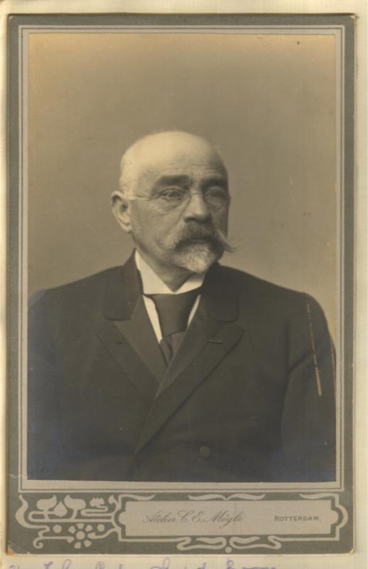 een van de broers